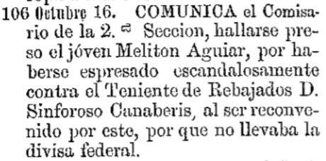 Octubre 16, 1840. COMUNICA el Comisario de la 2 Sección, hallarse preso el joven Meliton Aguiar, por haberse expresado escandalosamente contra el Teniente de Rebajados D. Sinforoso Canaberis (Canaveris) al ser reconvenido por este, por que no llevaba la divisa federal.